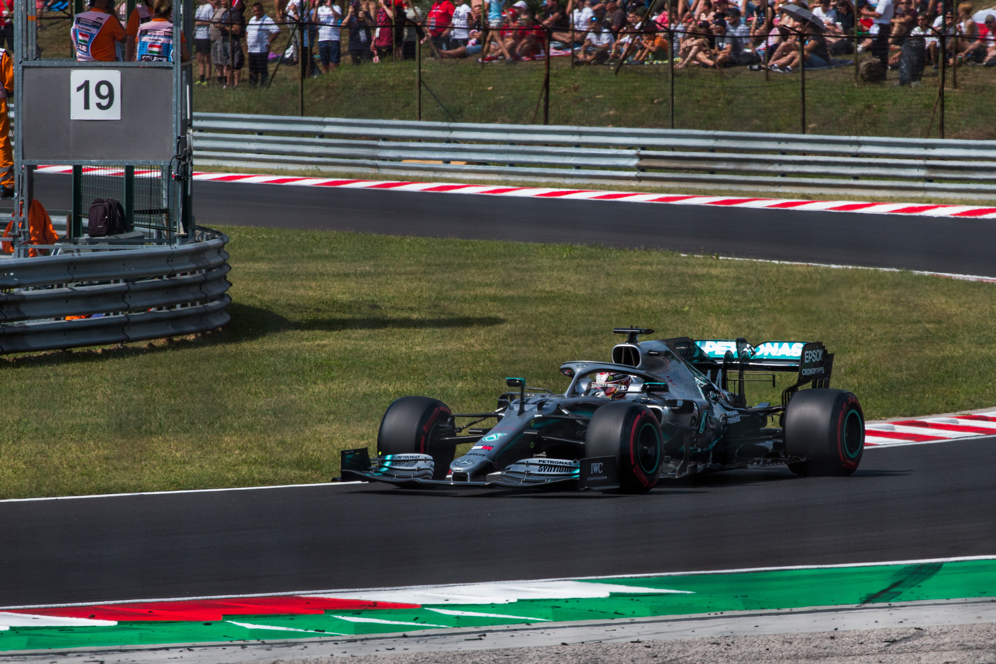 Lewis Hamilton in his Mercedes AMG F1 W10 EQ Power+ during Formula 1 Hungarian Grand Prix 2019 qualifying session on the Hungaroring